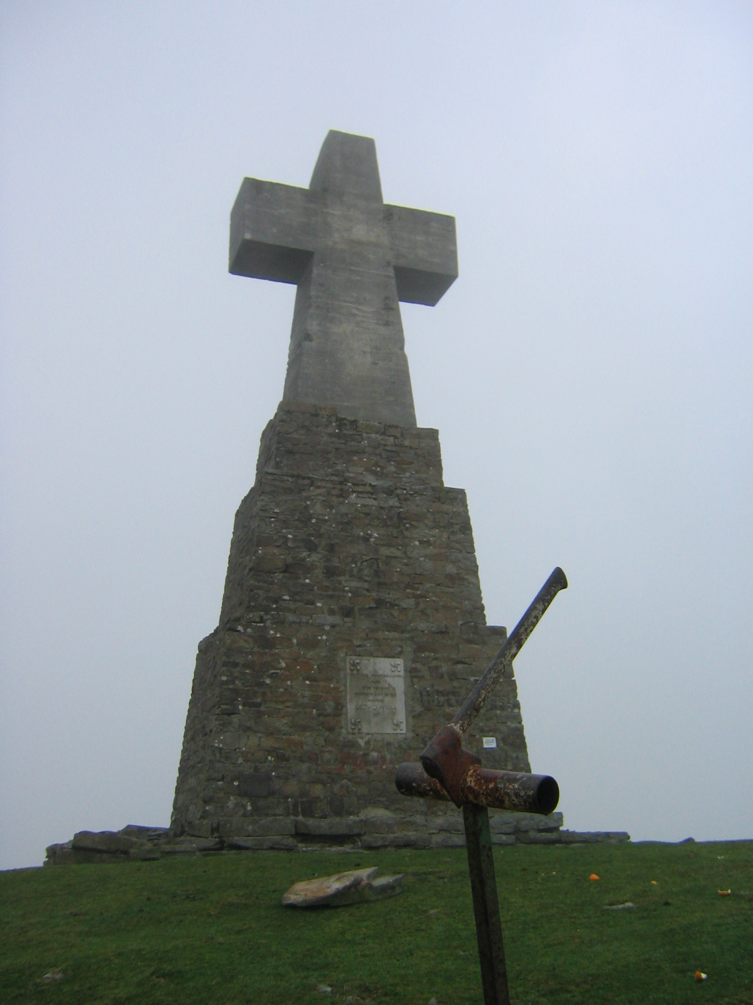 Montaña Saibigain Abadiano, Vizcaya, País Vasco, España.